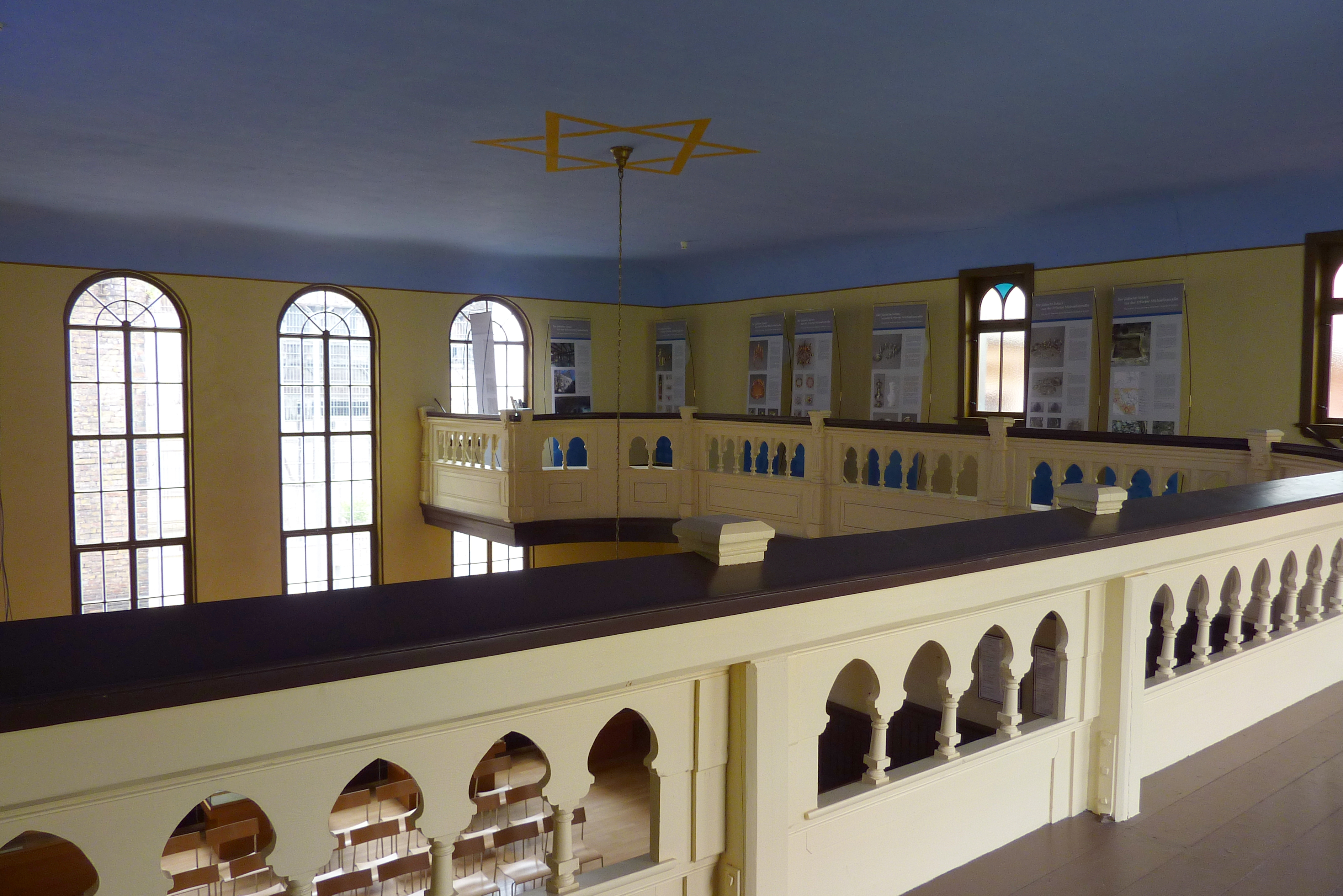 Synagoge in Mühlhausen in Thüringen